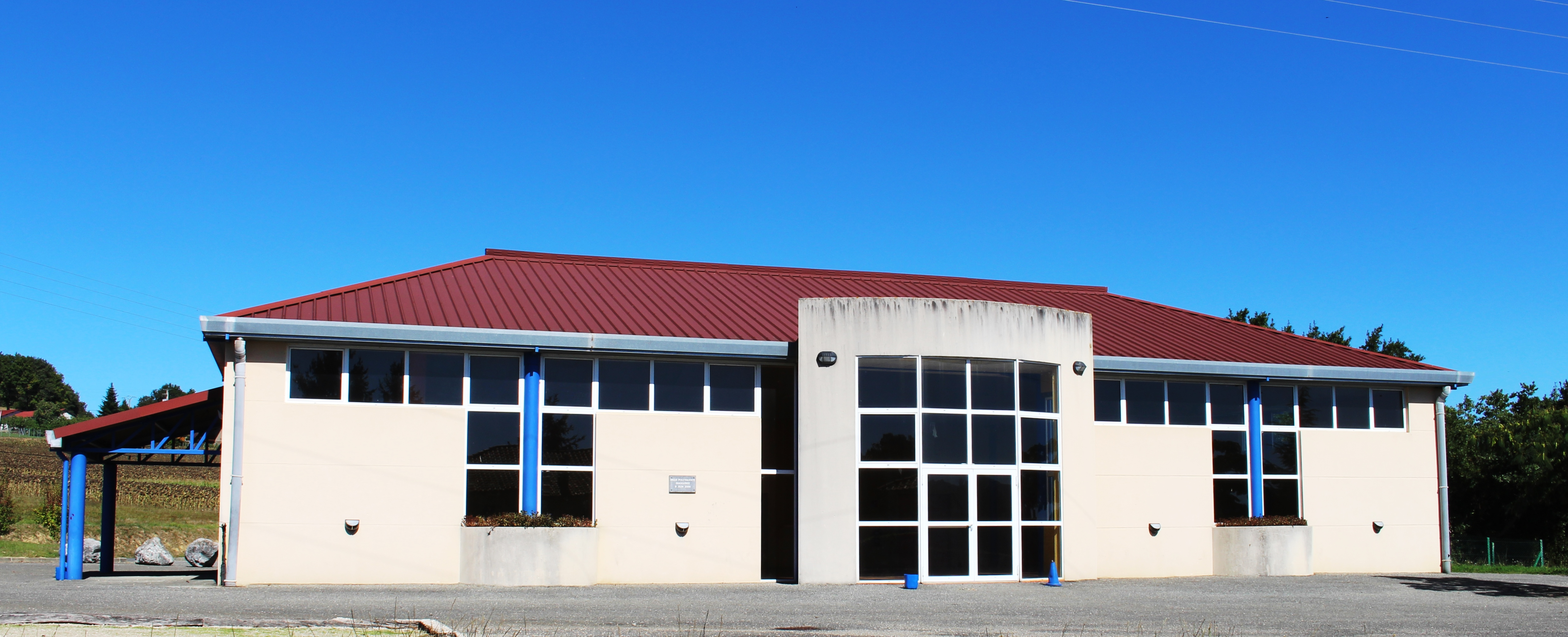 Salle des fêtes de Villembits (Hautes-Pyrénées)